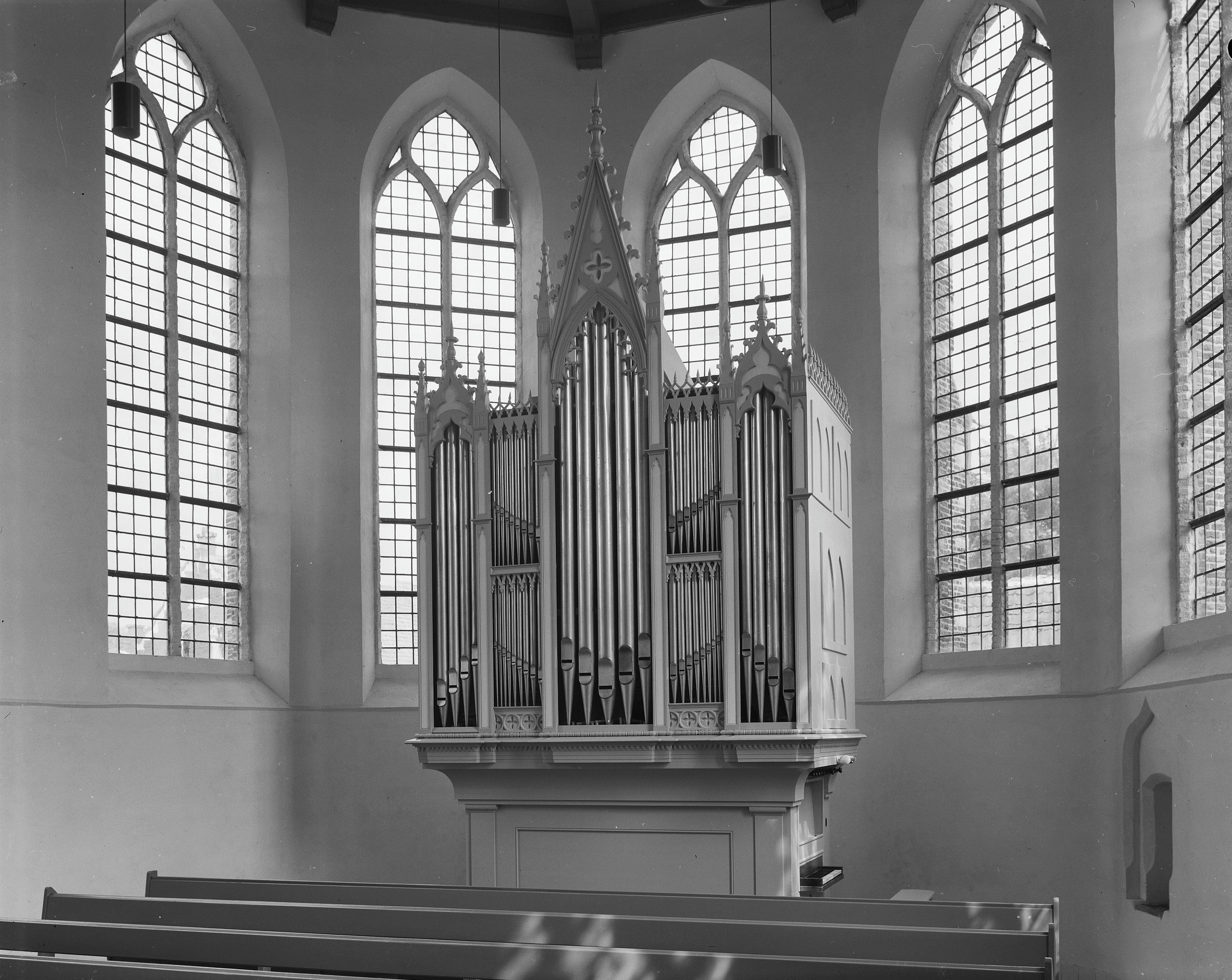 Nederlands Hervormde Kerk en Toren: interieur naar het oosten (orgel)